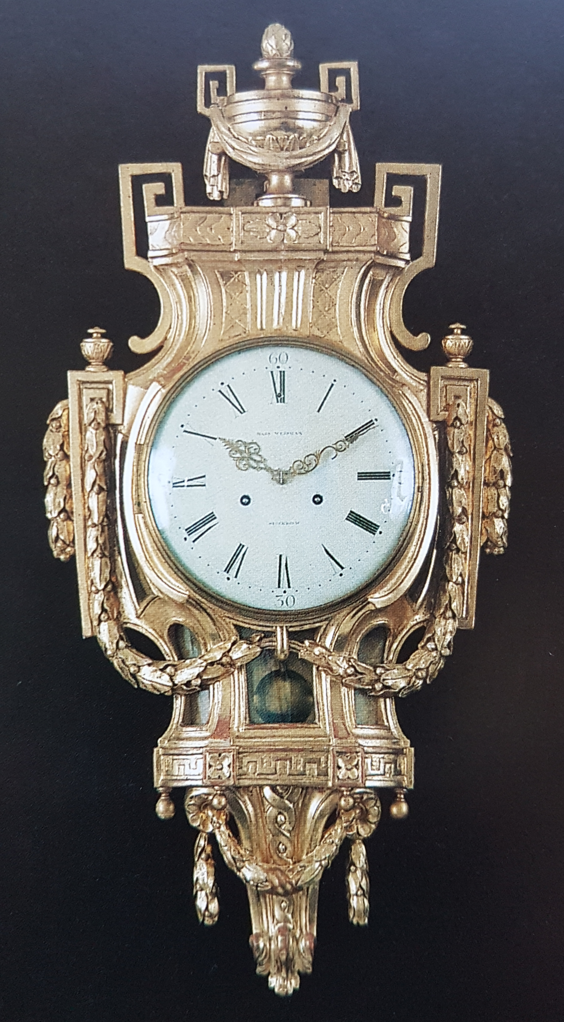 Pendyl tillverkad av Hans Wessman som var en Stockholms urmakare på 1700-talet